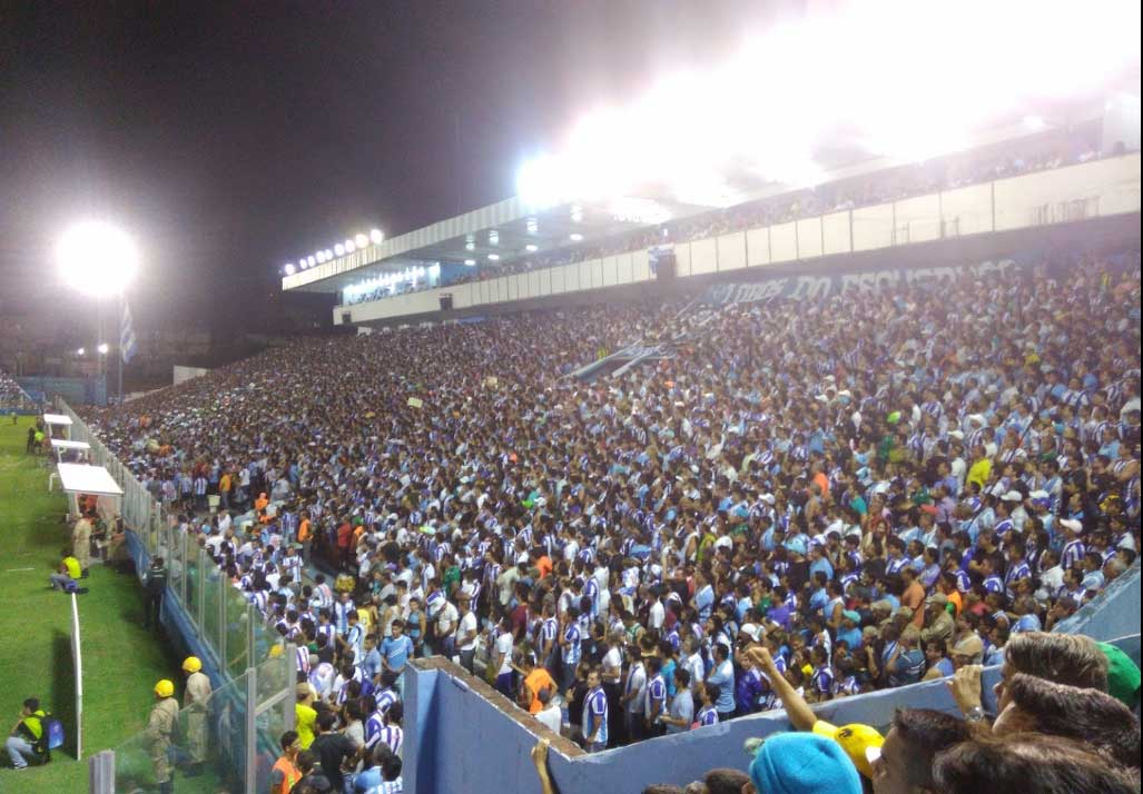 Estádio da curuzu cheio